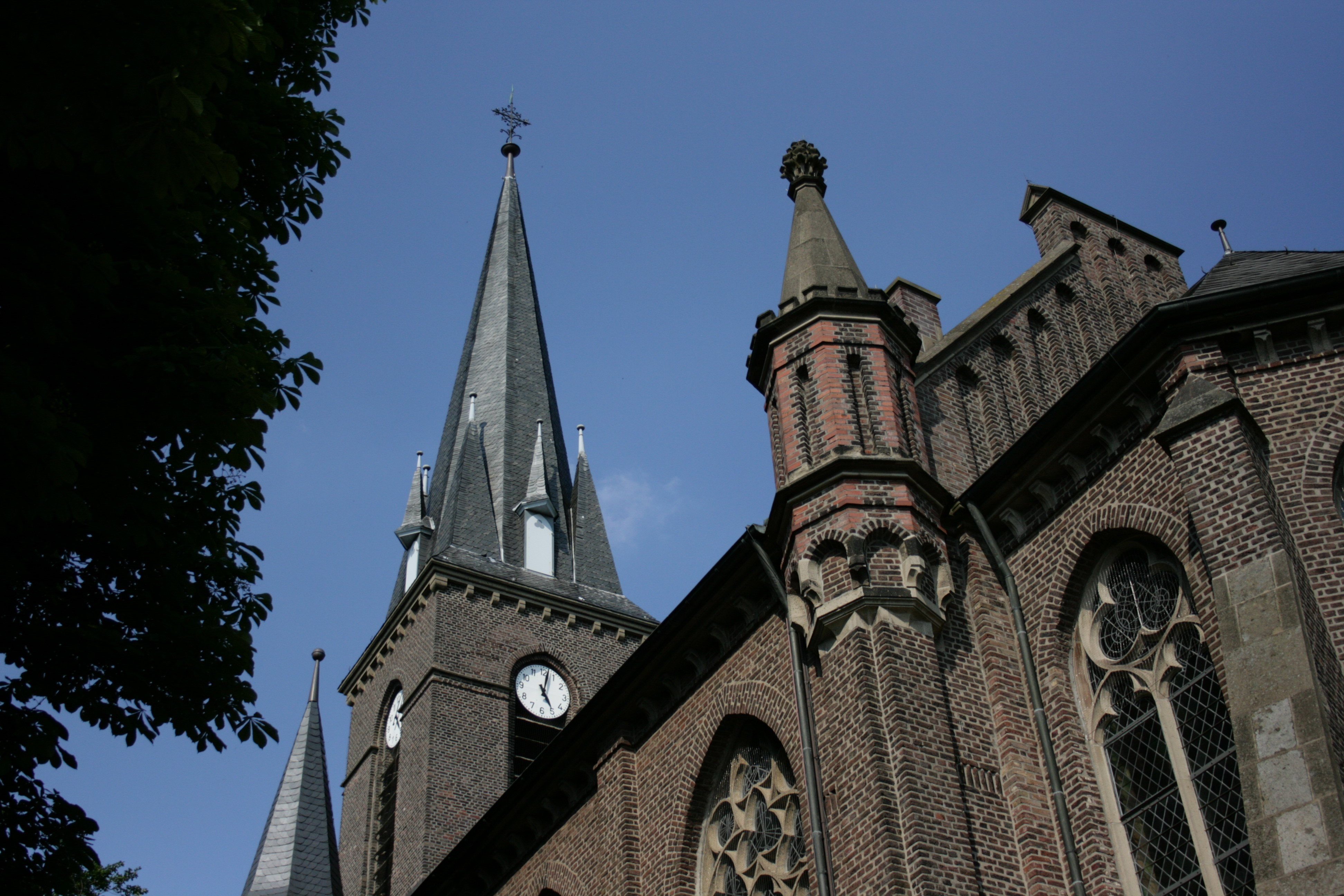 St. Peter und Paul an der Binnenstraße in Werth, Isselburg